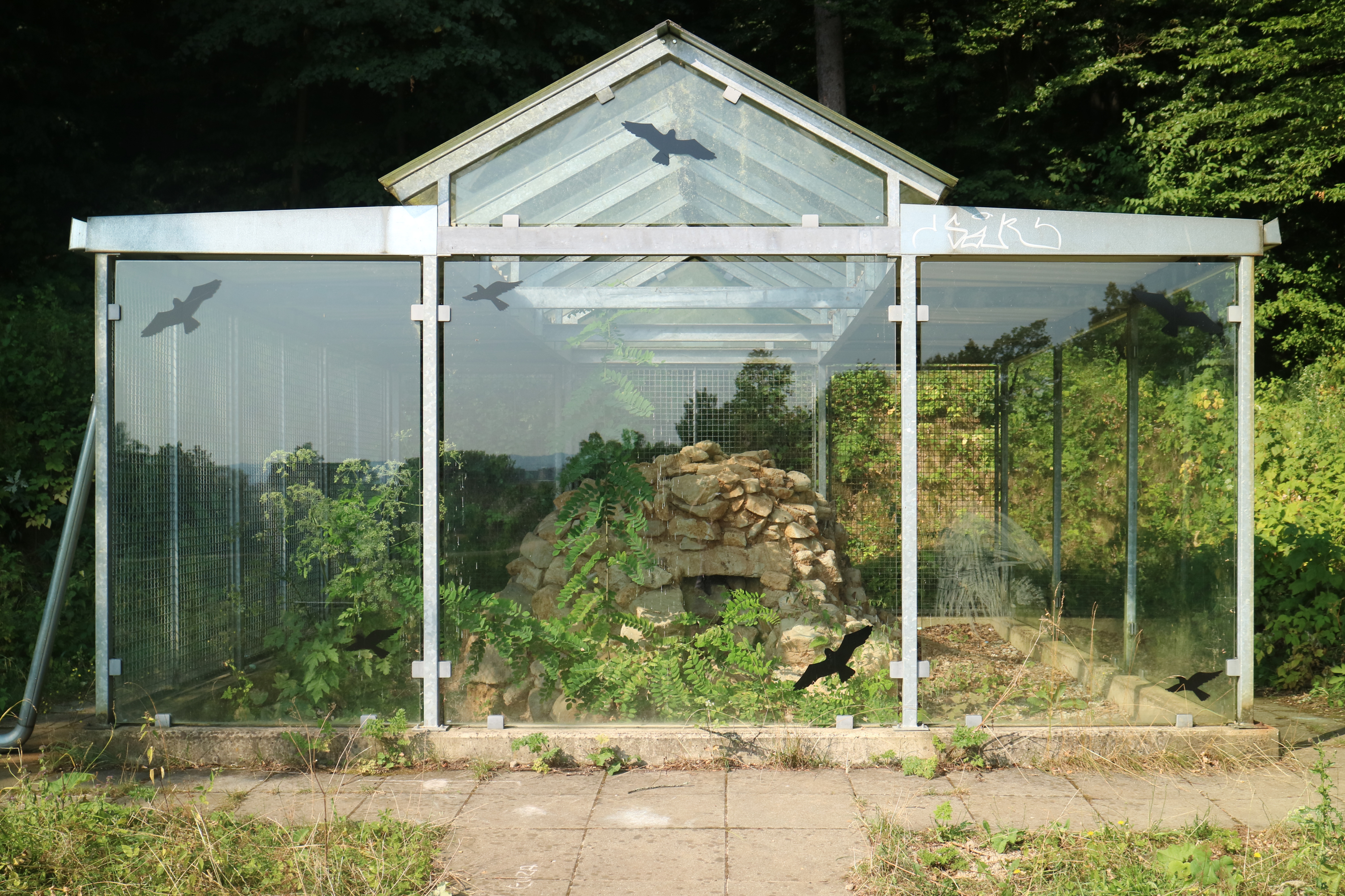 Durch Glashaus geschütztes römerzeitliches Hügelgrab in der Nähe der Bründlteiche, Graz-Straßgang